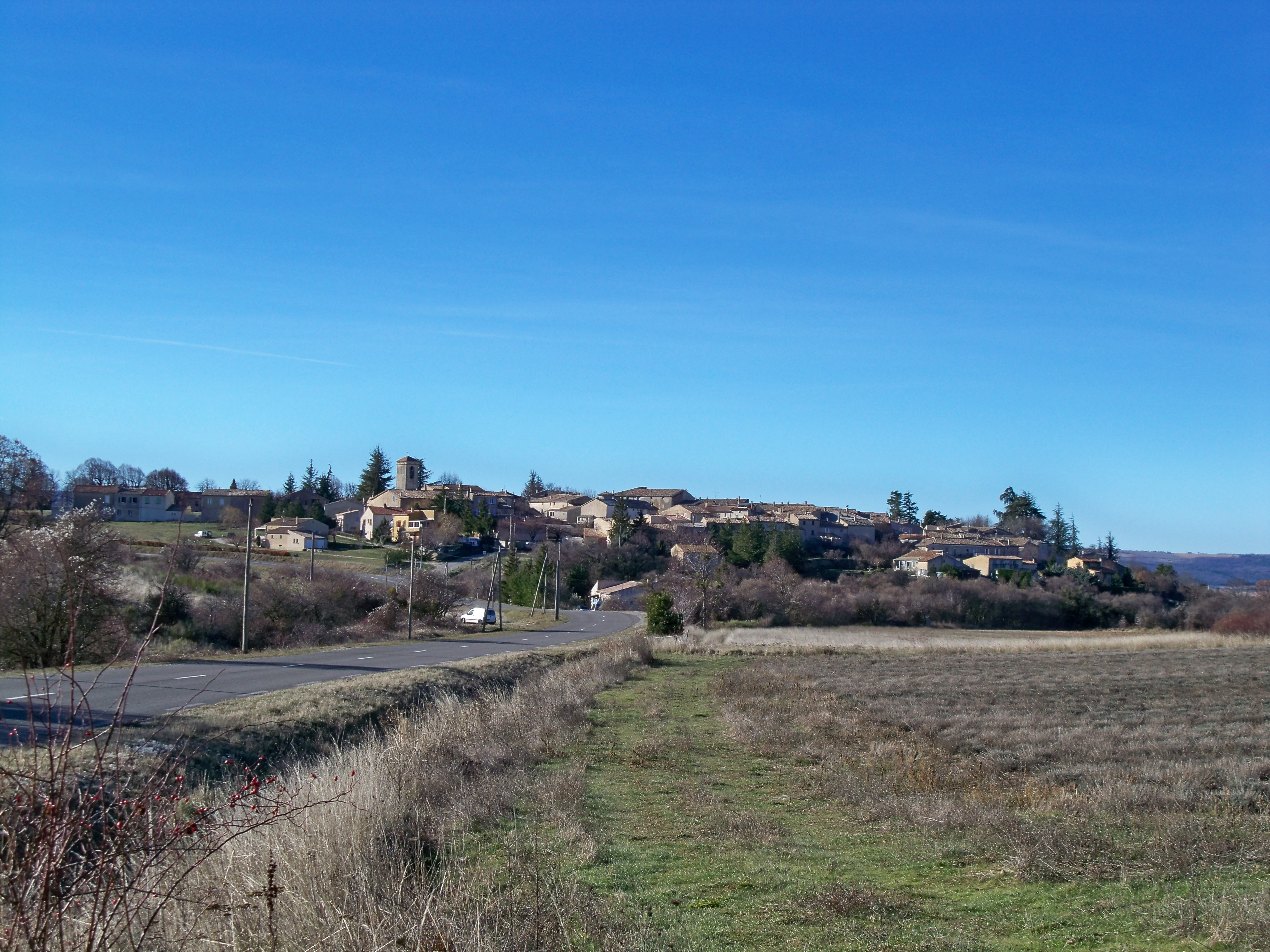 vue générale sur Revest du Bion (04)